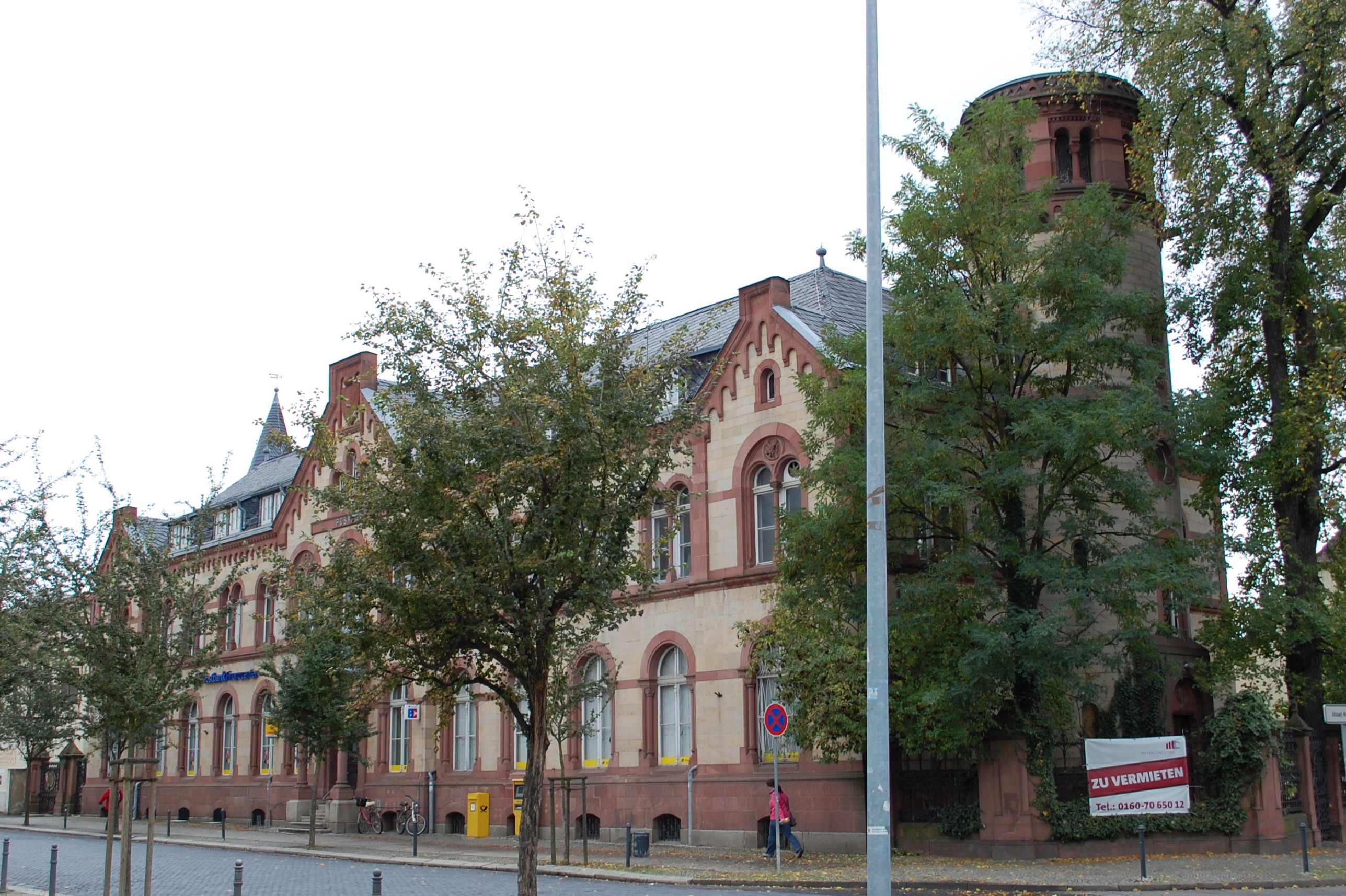 Postamt Bahnhofstraße 15 in Quedlinburg